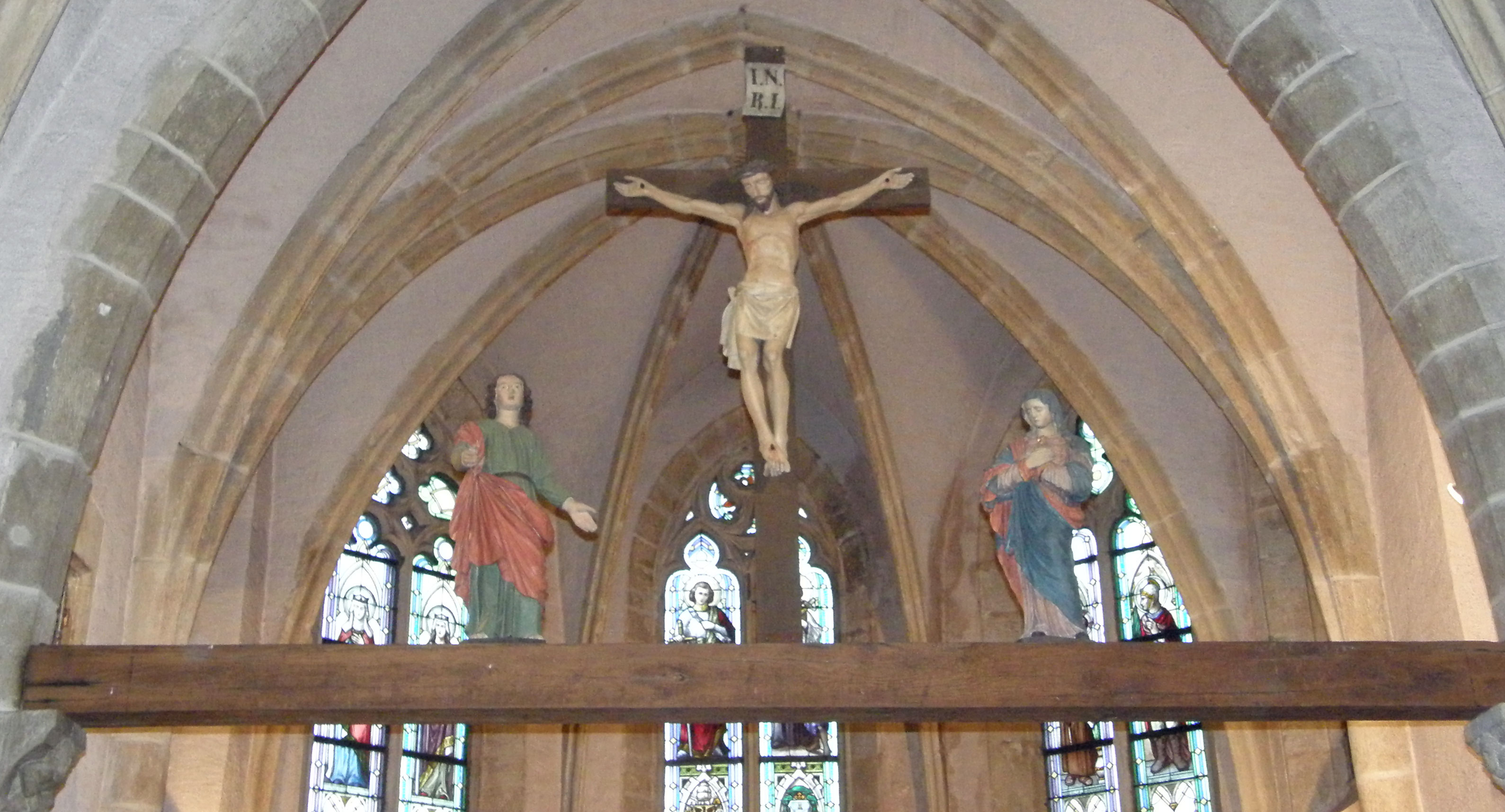 Sujet:Kräizegungsgrupp an der Waldbriedemesser Kierch Source:Eege Foto vum User:Cornischong